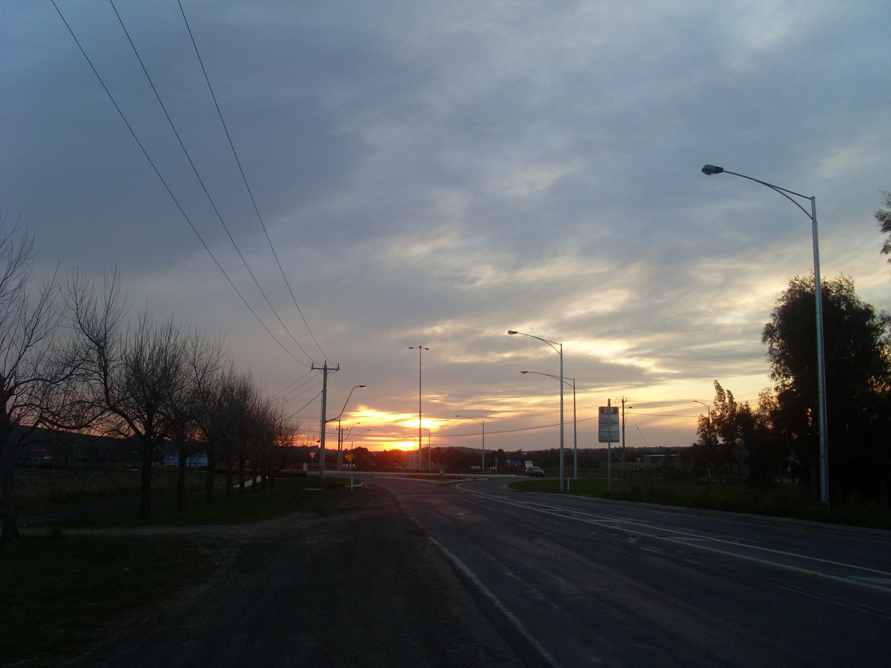 evening sky at Wallan, Victoria Australia